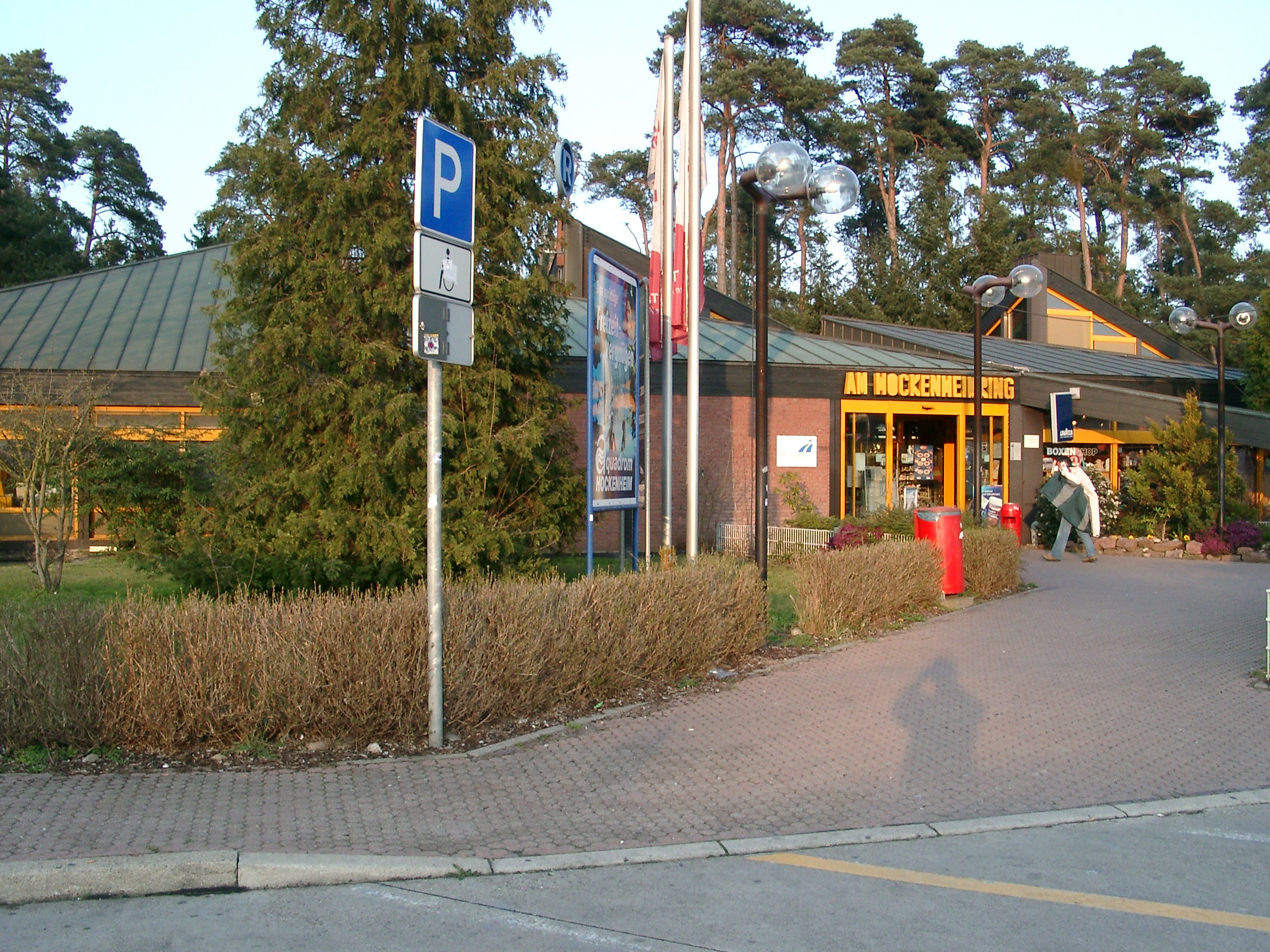 Bundesautobahn-Raststätte Hockenheim Ost auf der A6 Nähe Heidelberg/Mannheim